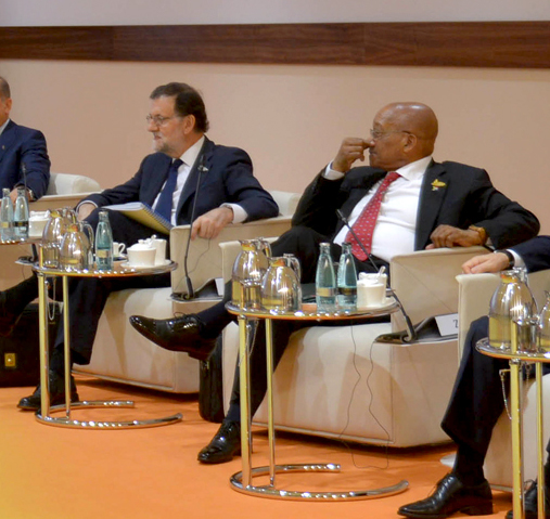 Cumbre de Líderes del G20